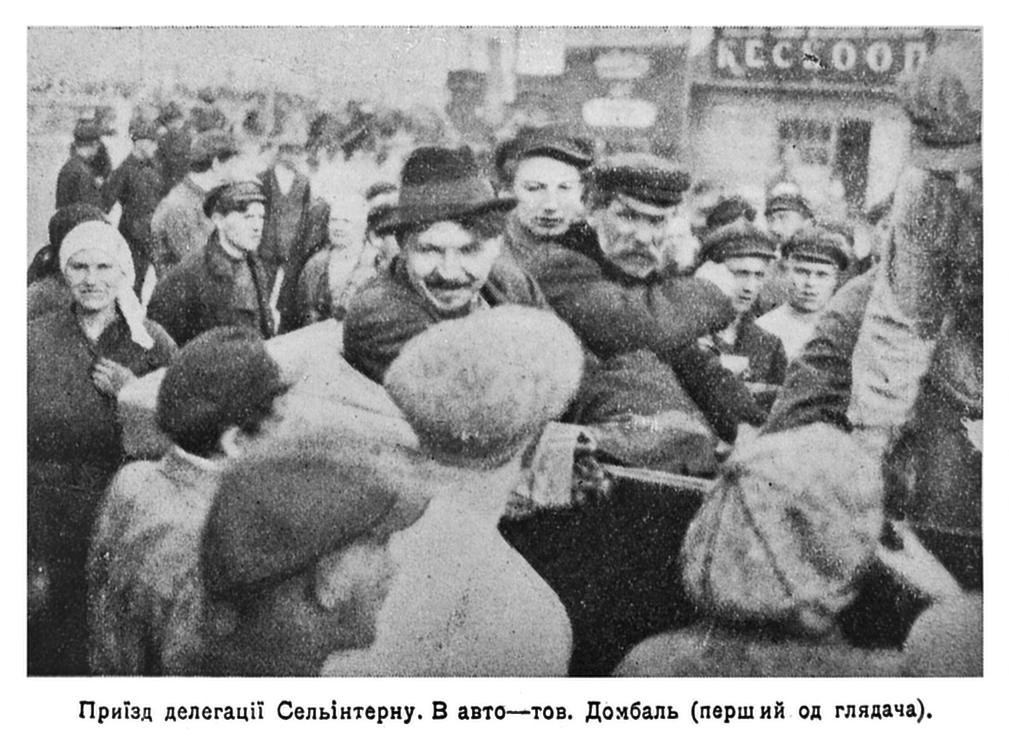 Фотография Томаша Домбаля